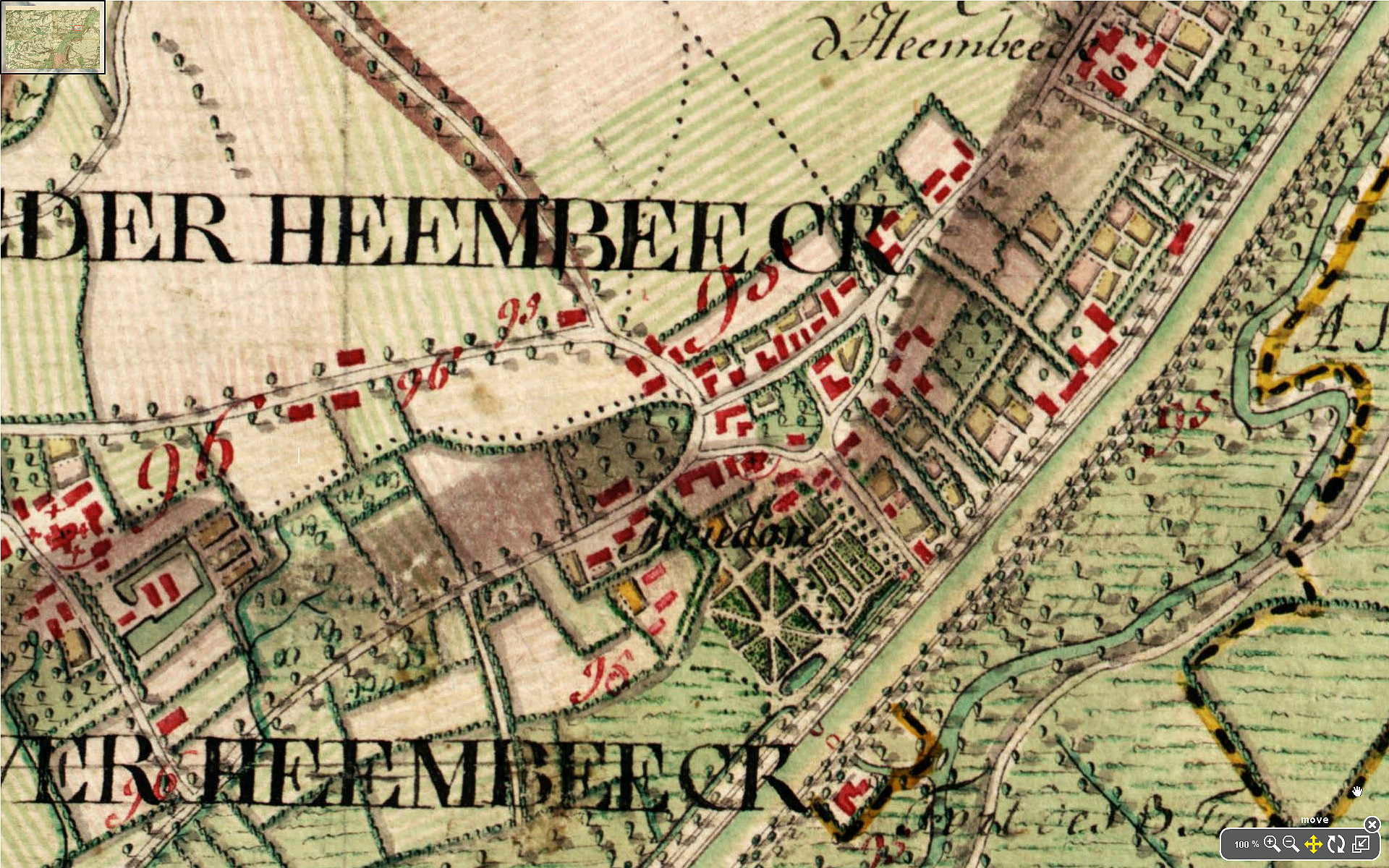 Neder-over-Heembeeck:le château Meudon et ses environs(carte de Ferraris 1777)